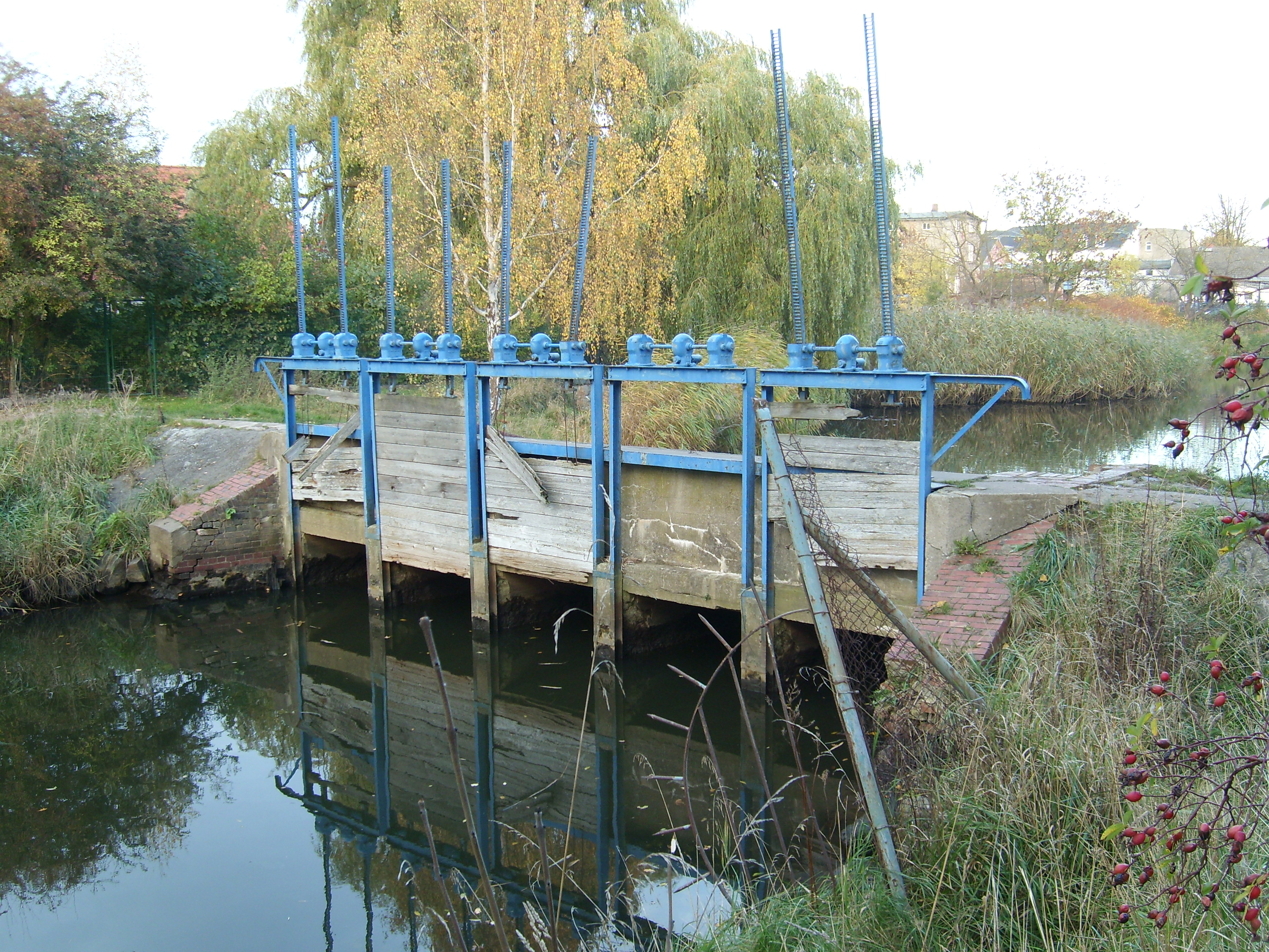 altes Wehr am Ryck (Greifswald)